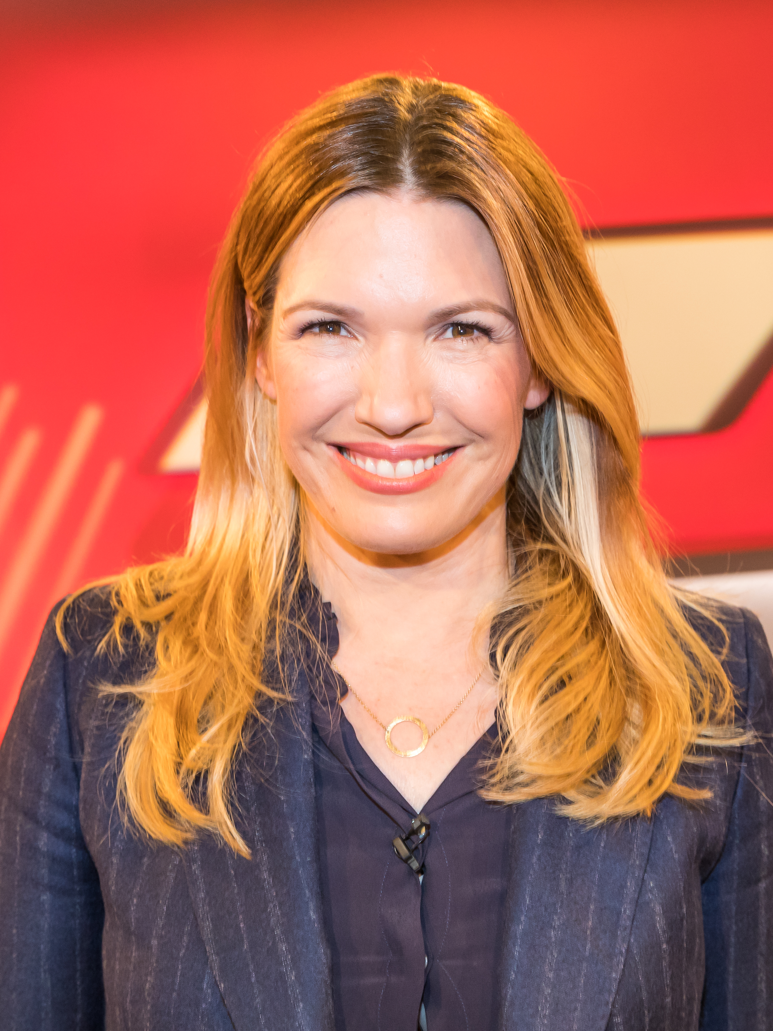 MAISCHBERGER am 17. Oktober 2018 in Köln. Produziert vom WDR. Thema der Sendung: „Watschn für die Volksparteien: Wer braucht noch Union und SPD?“ Foto: Jessica Libbertz (Fußballmoderatorin)